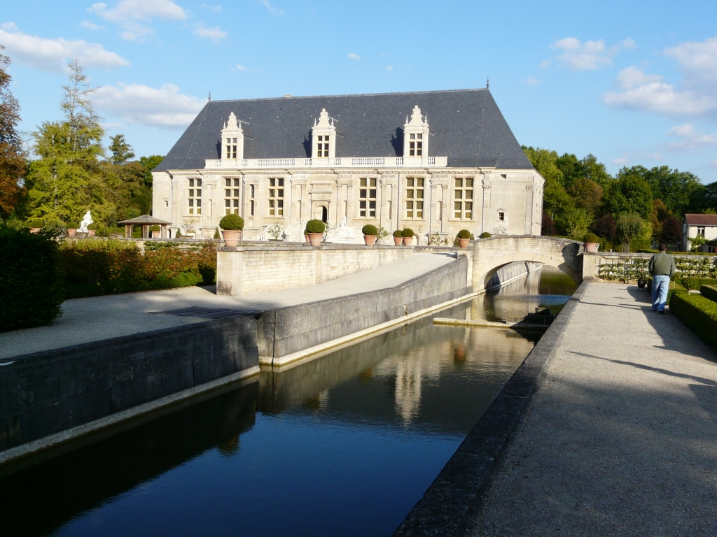 Joinville (52) - Château du Grand Jardin - Vue depuis le canal